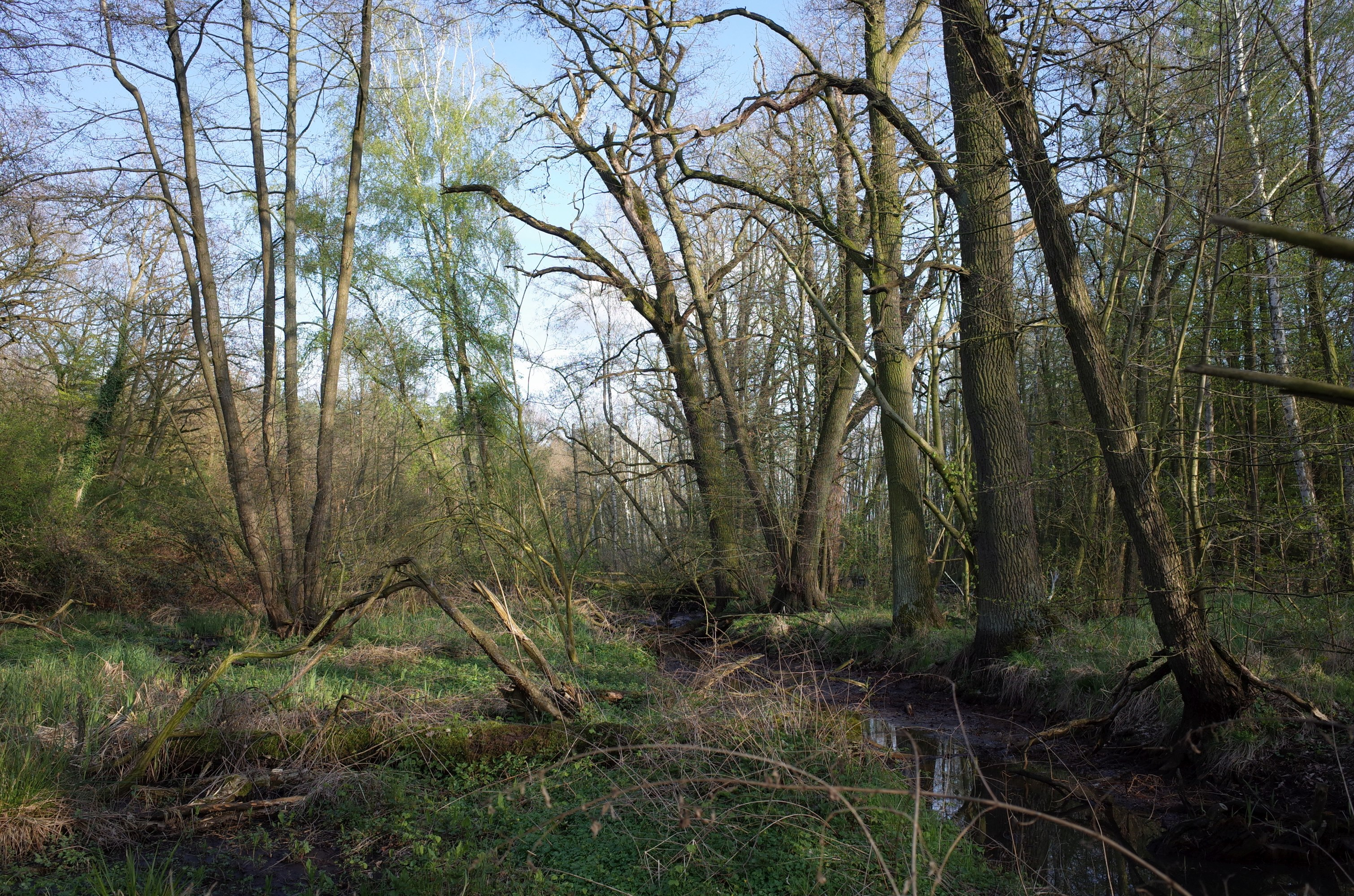 Dessau-Roßlau, Ortsteil Kochstedt. FFH-Gebiet Brambach und NSG Brambrach.